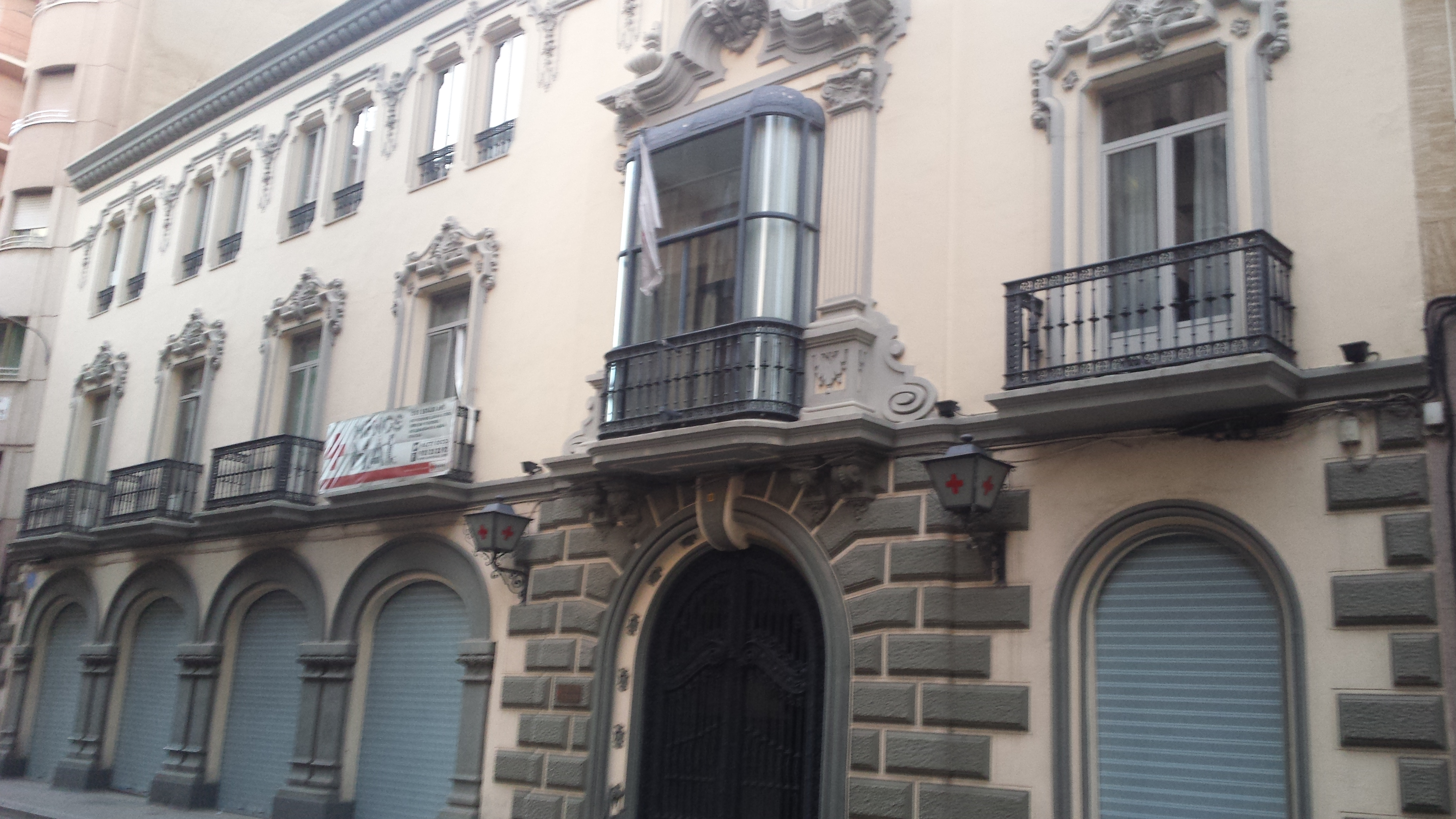 Edificio de la Cruz Roja